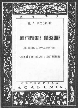 Книга Бориса Розинга, 1923 год. Размер 443х600